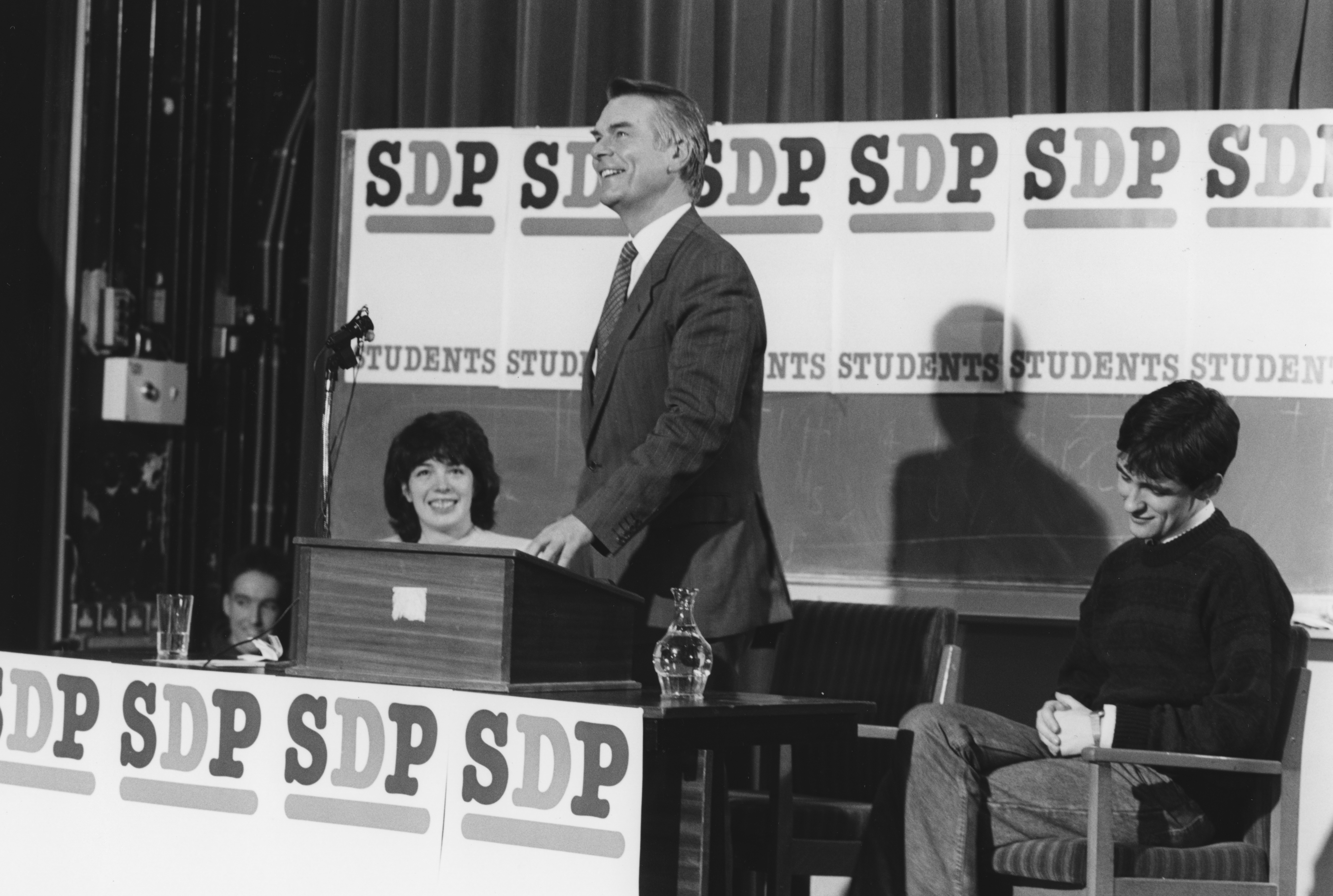 IMAGELIBRARY/290 Persistent URL